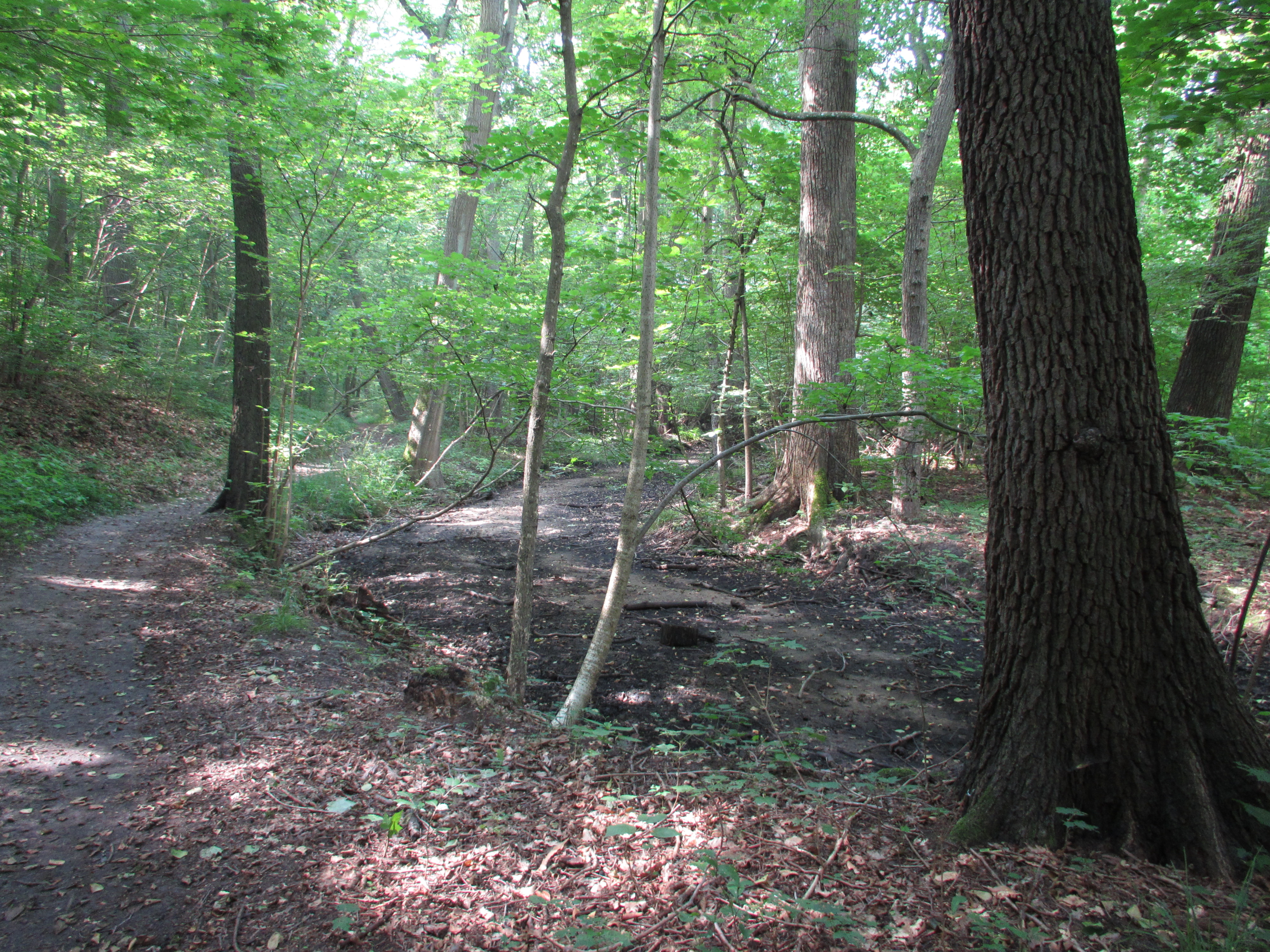 Im Annatal - Strausberg